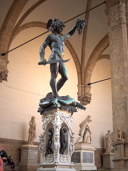 Escultura de Cellini